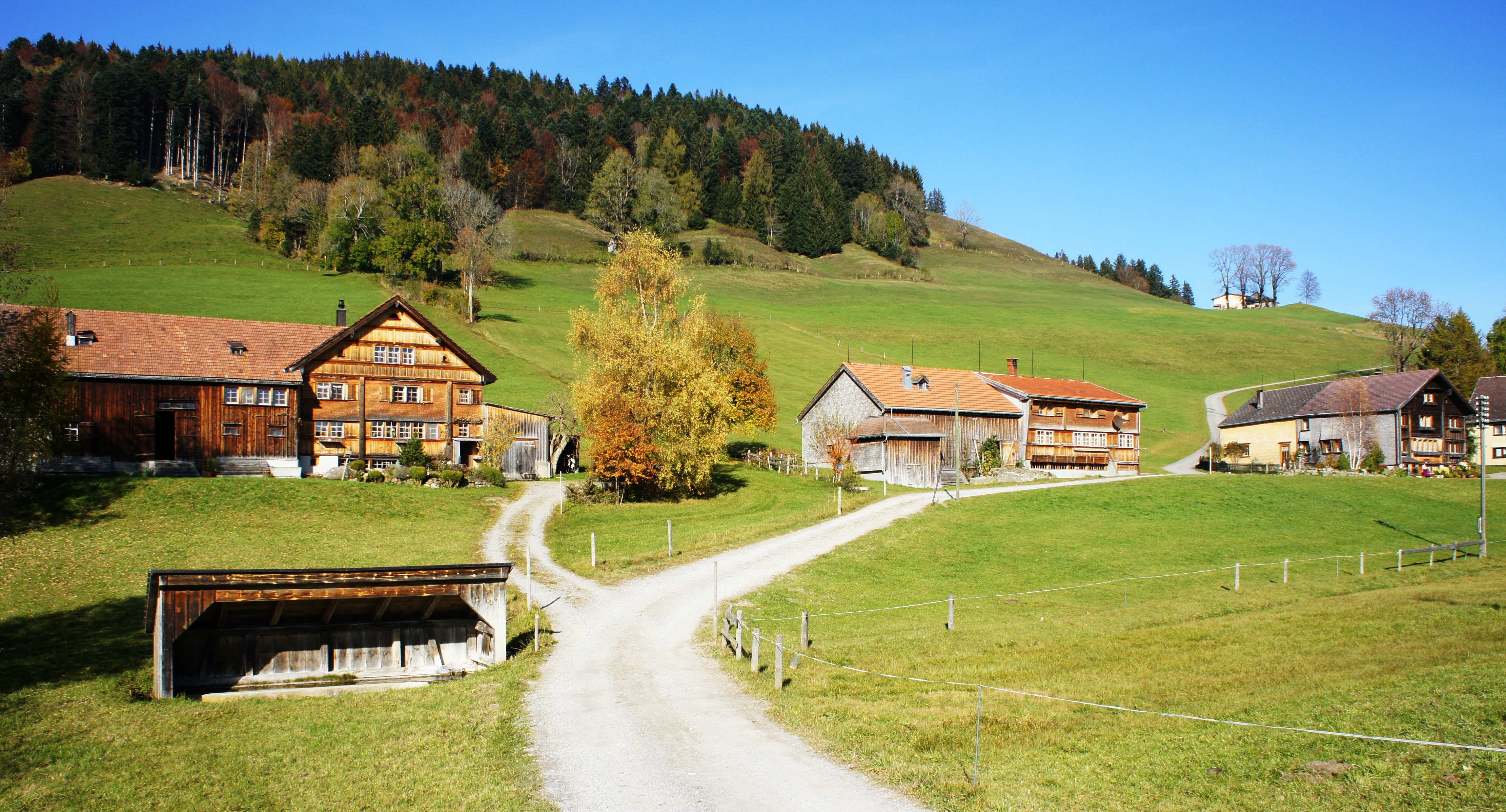 Blick aus Südwesten auf eine Häusergruppe im Weiler Ballmoos in Gais. Links im Vordergrund ein mit einer offenen Holzhütte geschützter Brunnentrog, der fast ganz im Boden versenkt ist. Dahinter steht ein Bauernhaus mit nach links und in Kreuzfirstform angebauter Scheune. In der Mitte des Bildes ein Bauernhaus, ebenfalls mit linksseitig angebauter Scheune. Diesmal aber verlaufen die Firste gleich und das Wohnhaus ist ein sogenanntes Heidenhaus. Am rechten Bildrand weitere Wohnhäuser. Etwas oberhalb der Siedlung ist ein weiteres Wohnhaus mit Scheune zu erkennen. Im Hintergrund eine bewaldete Hügelkuppe vor blauem Himmel.